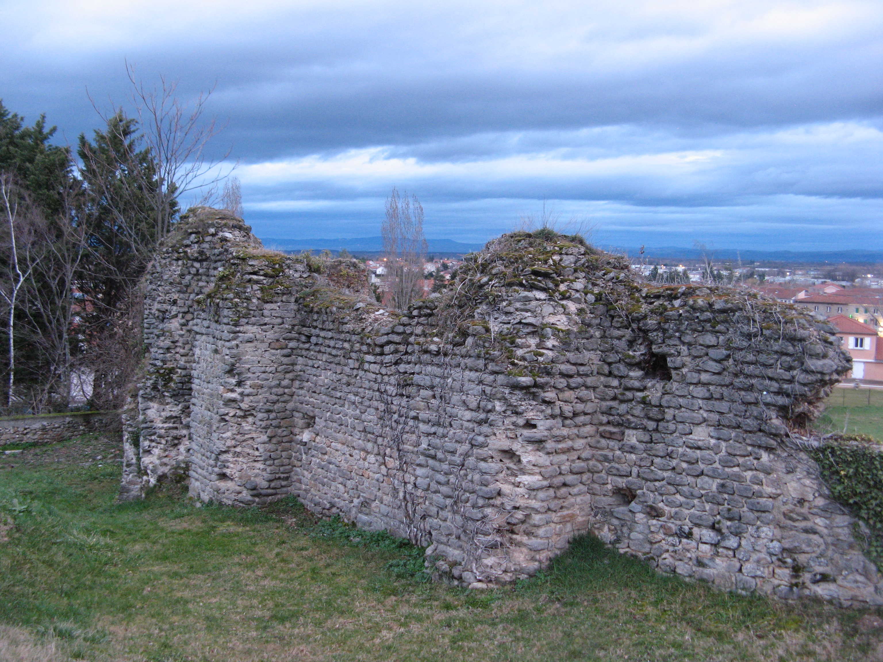 Montbrison, Moingt, théâtre romain, extérieur